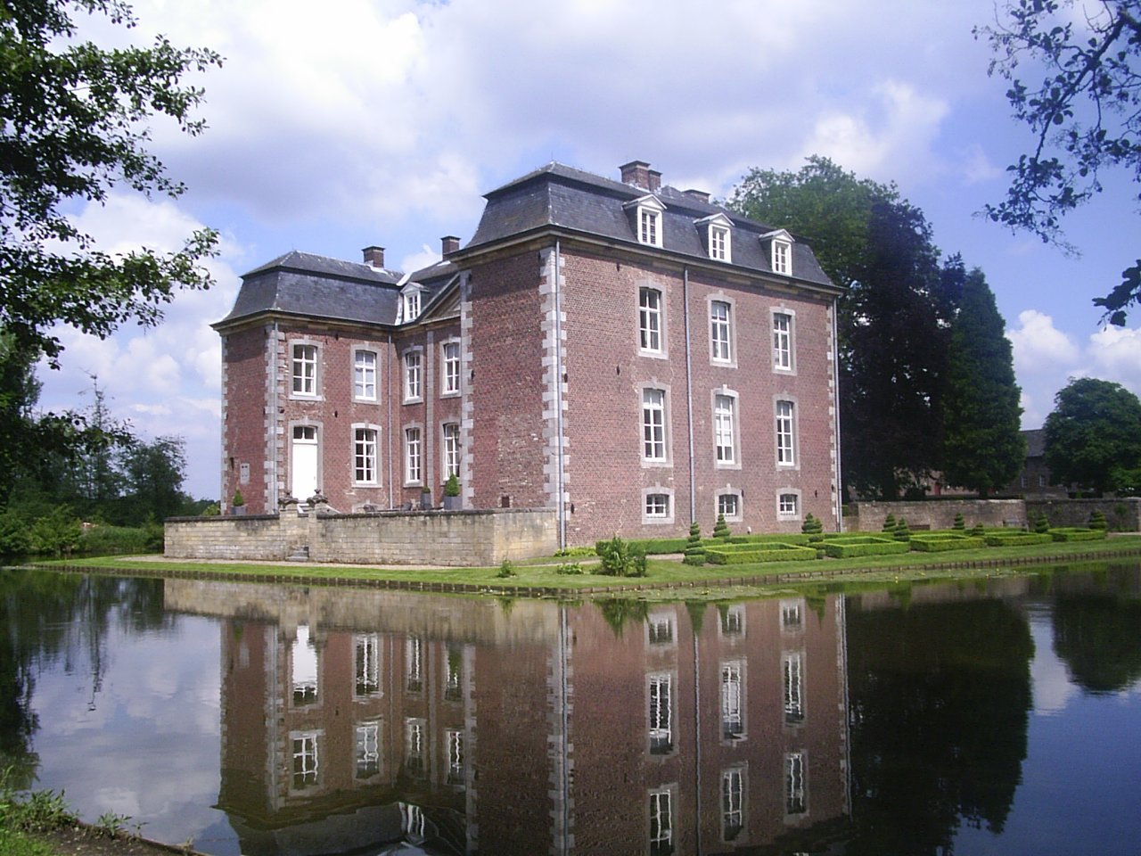 Kasteel Cortenbach (Voerendaal). Foto zelf gemaakt, 6 juni 2006.